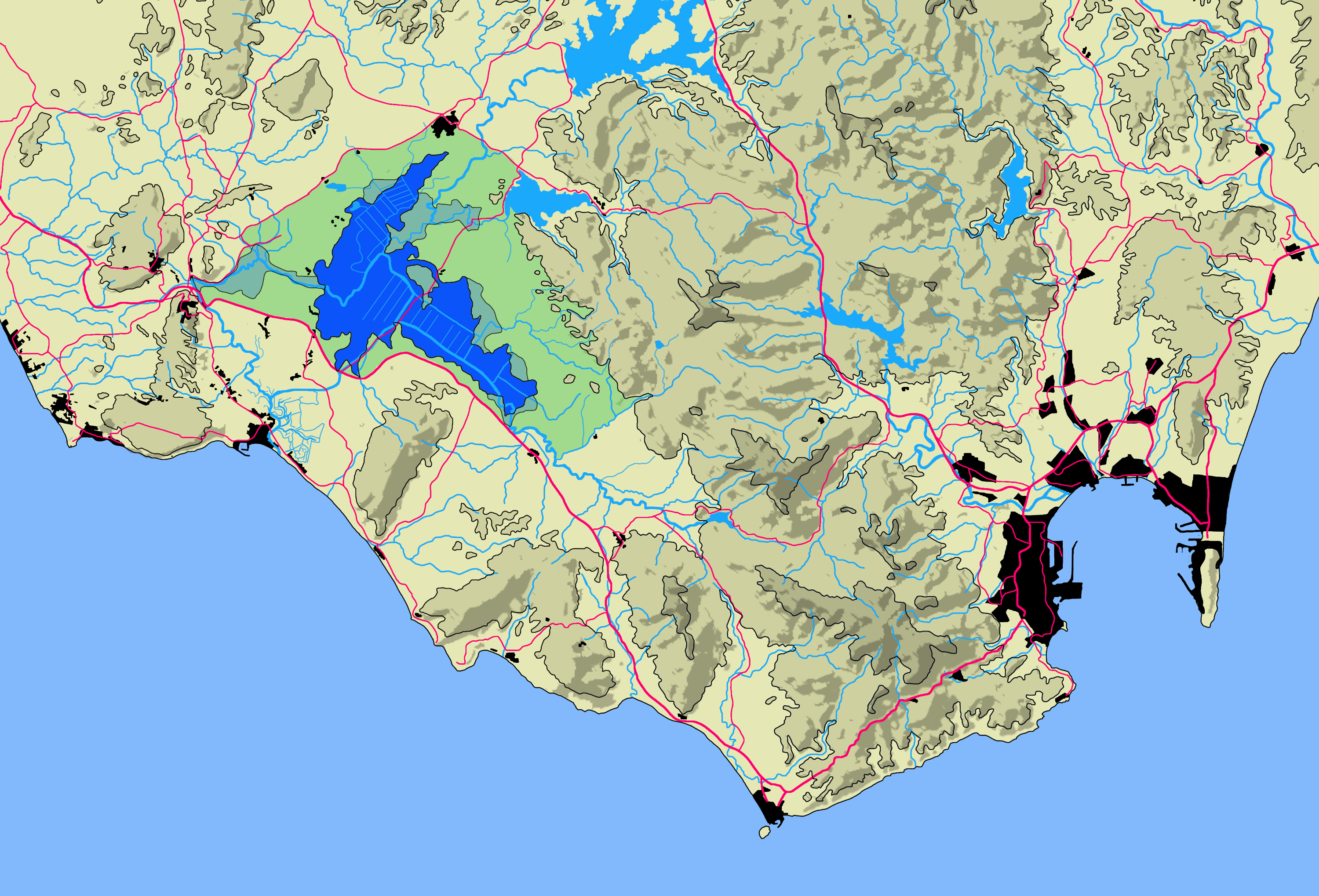 Mapa de la situación aproximada de la Laguna de la Janda antes de su desecación. Comarca de La Janda, Campo de Gibraltar, Andalucía, España.